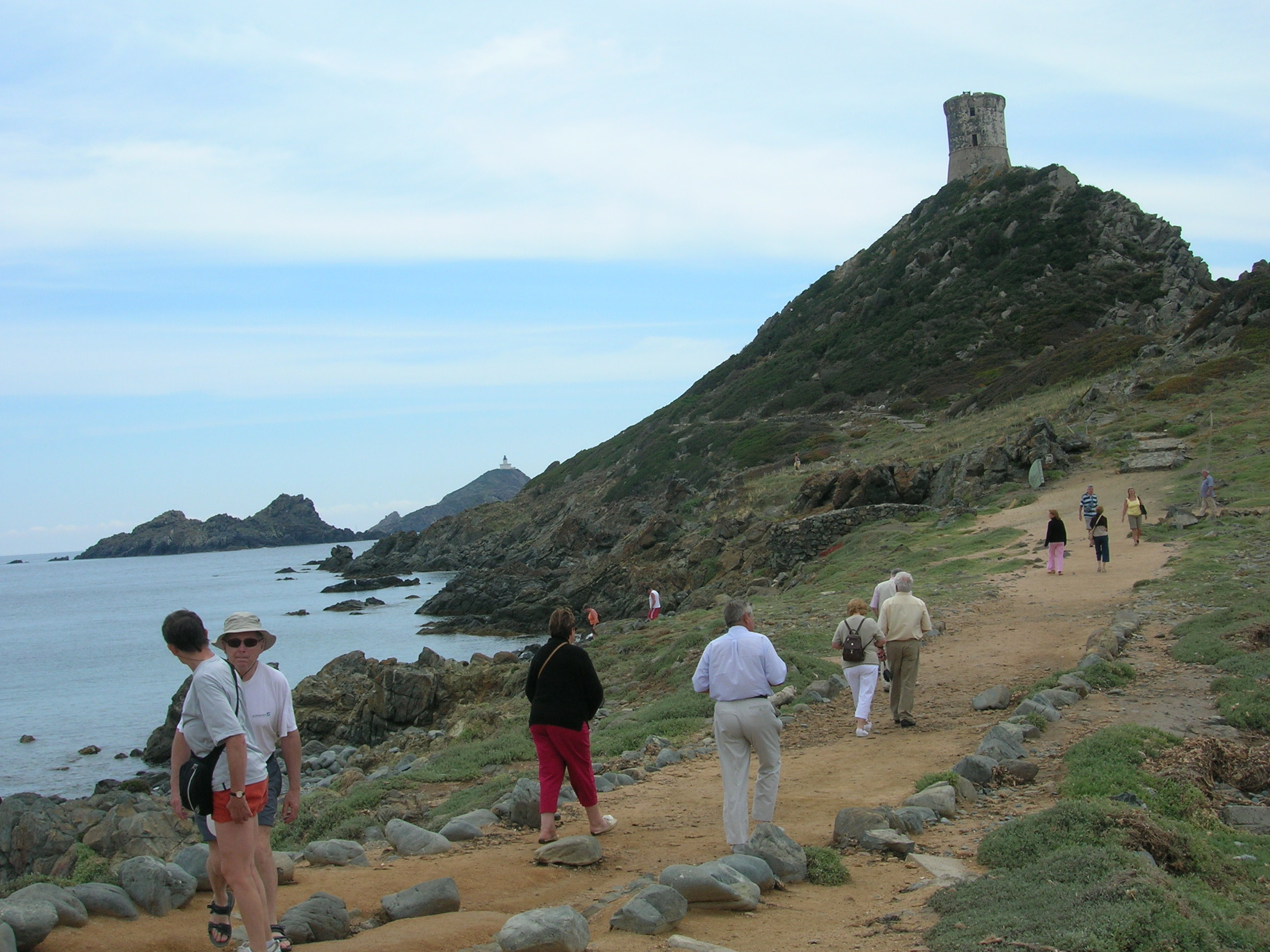 Iles sanguinieres